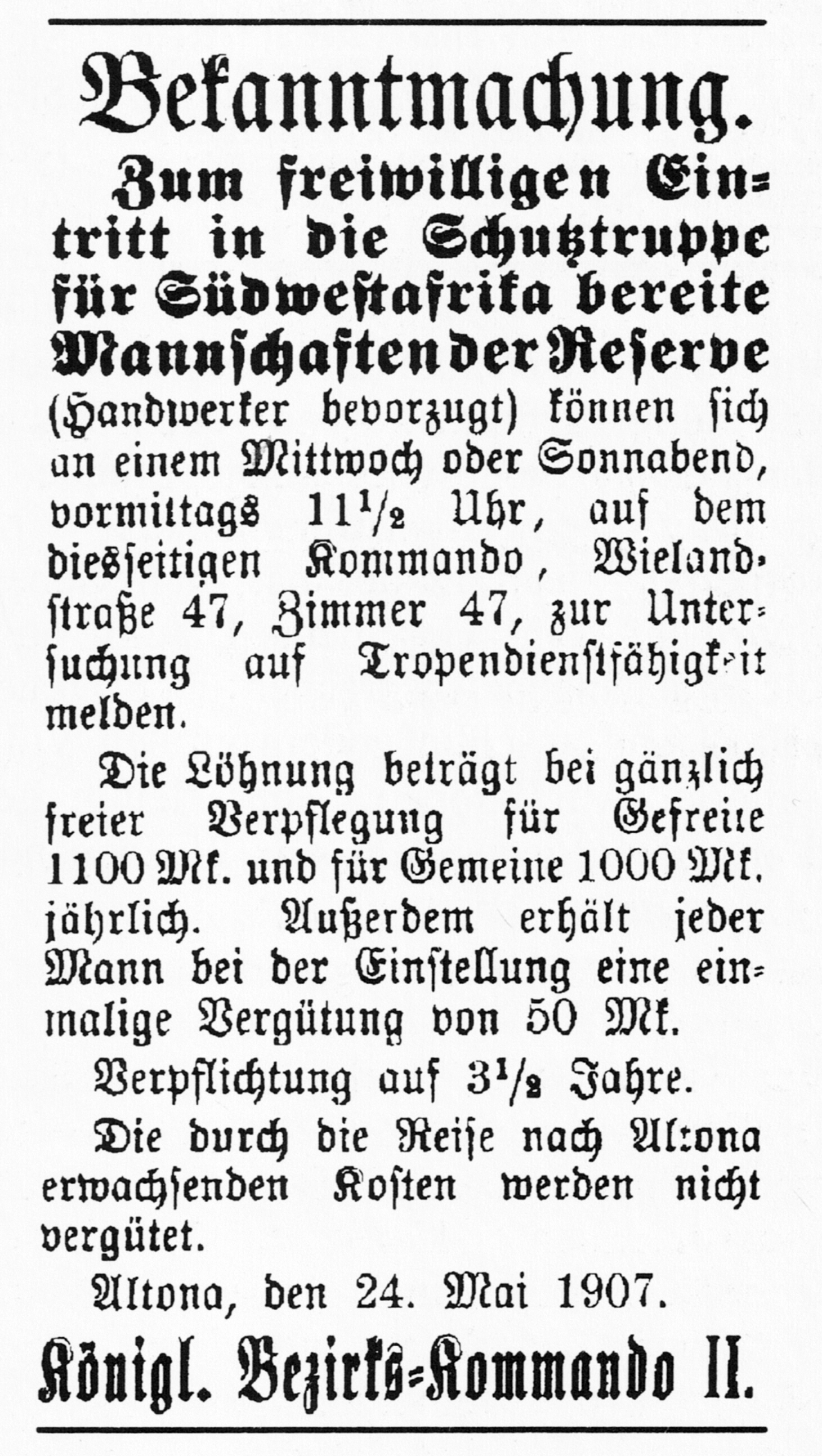 Bekanntmachung zum freiwilligen Eintritt in die Schutztruppe in Südwestafrika, Anzeige aus den Uetersener Nachrichten vom 27. Mai 1907